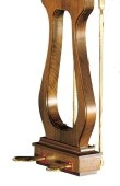 Darstellung einer Lyra mit Pedalen (Flügel)